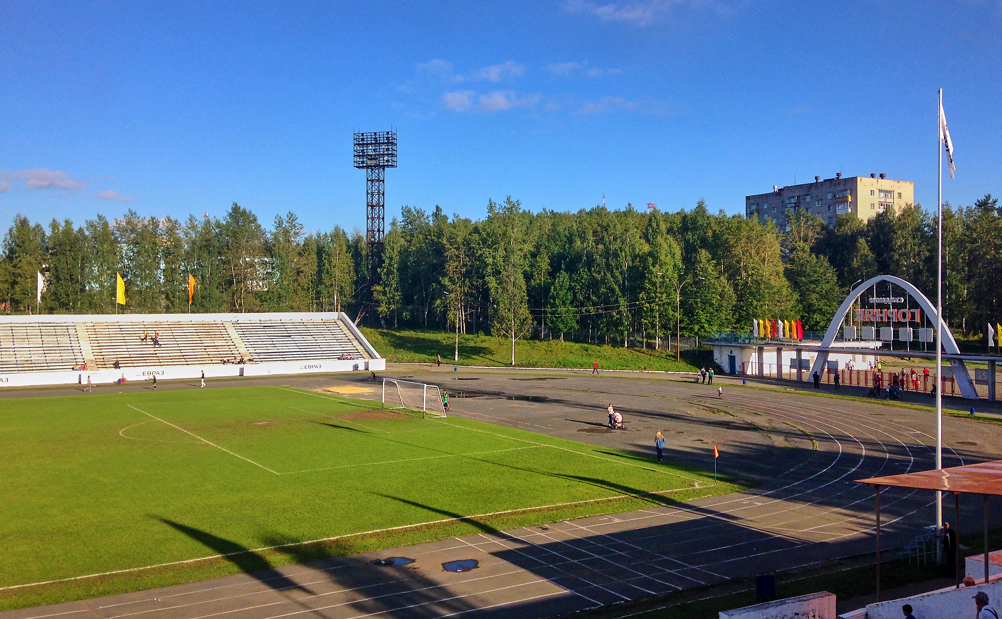 Стадион "Горняк" в Качканаре